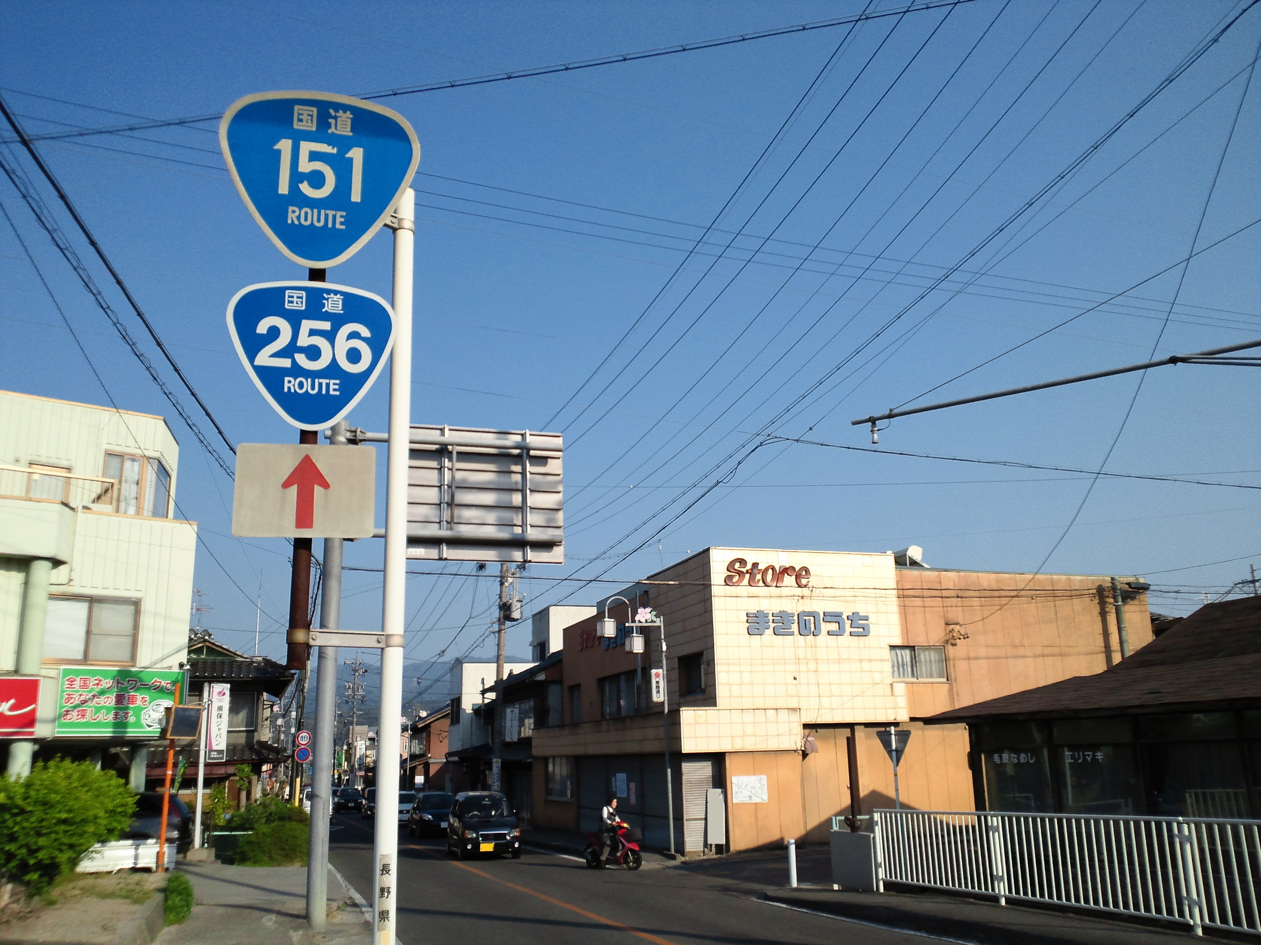 飯田市内の国道151号。国道256号との重複区間。